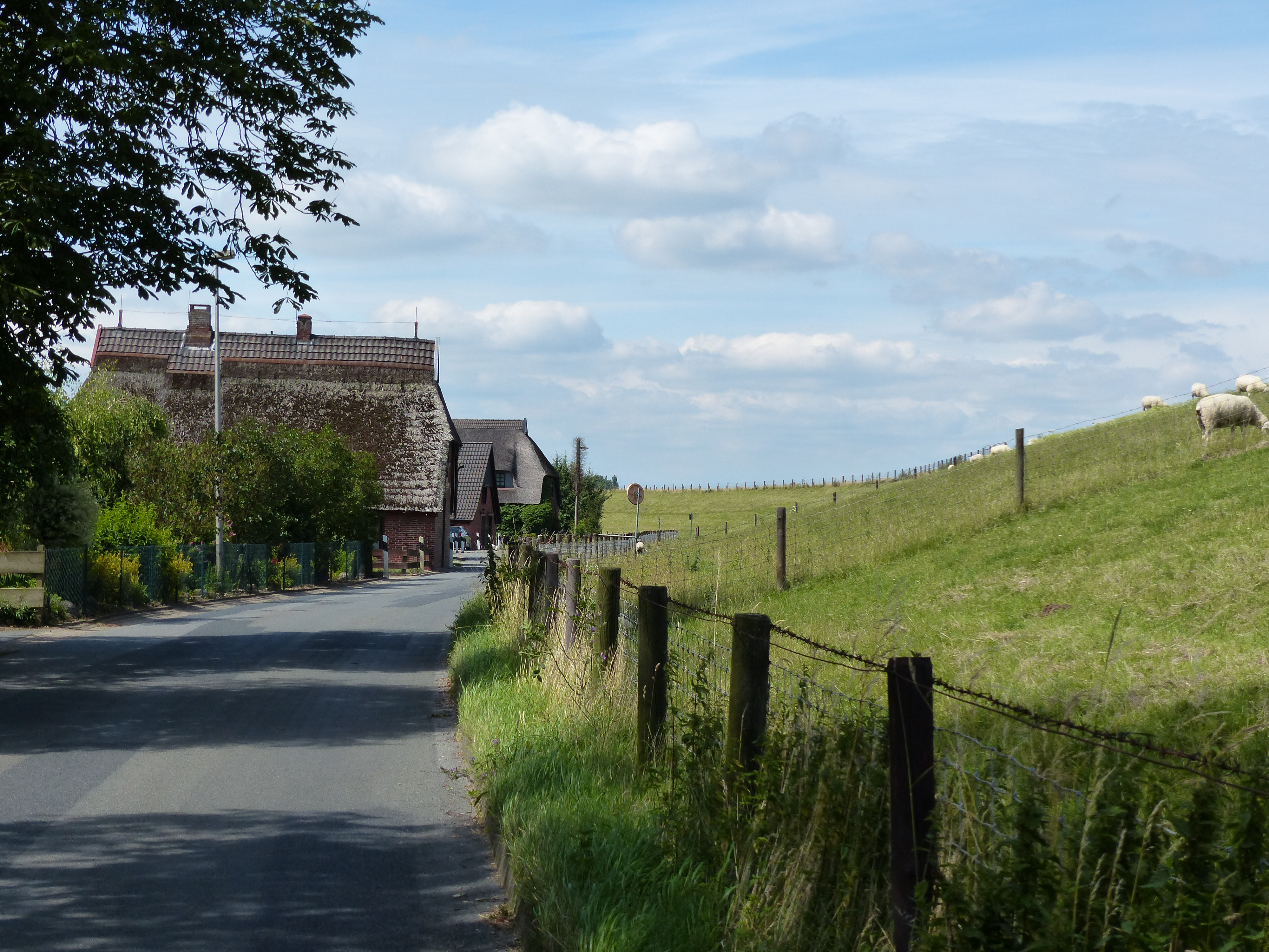 Schifferhäuser hinter dem Deich und Schafe auf dem Deich in Lemwerder-Ritzenbüttel